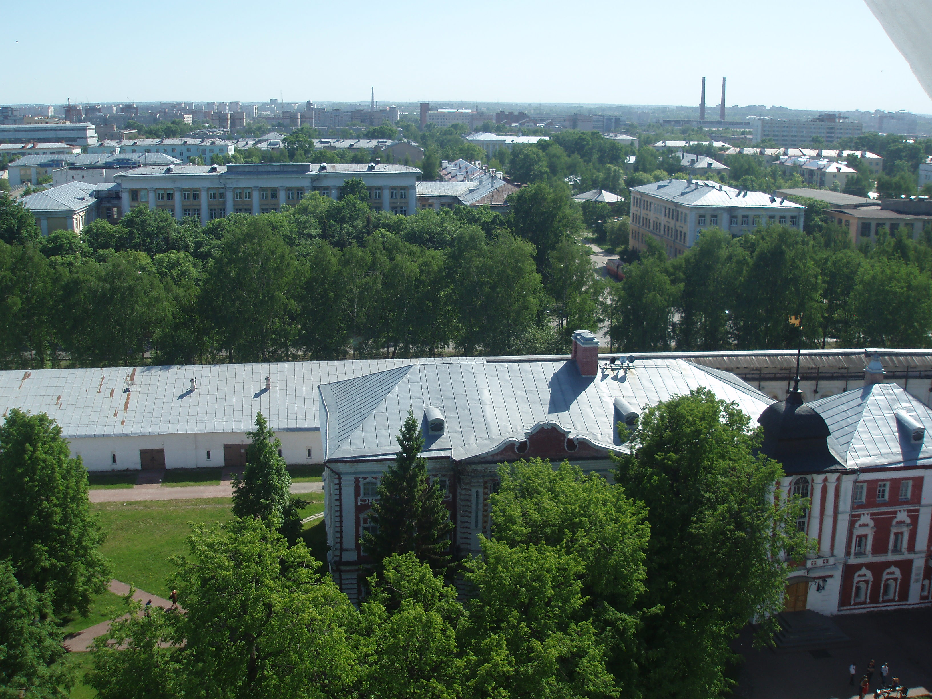 Ансамбль Вологодского кремля (Вологодская область, Вологда, Улица Орлова, 15)